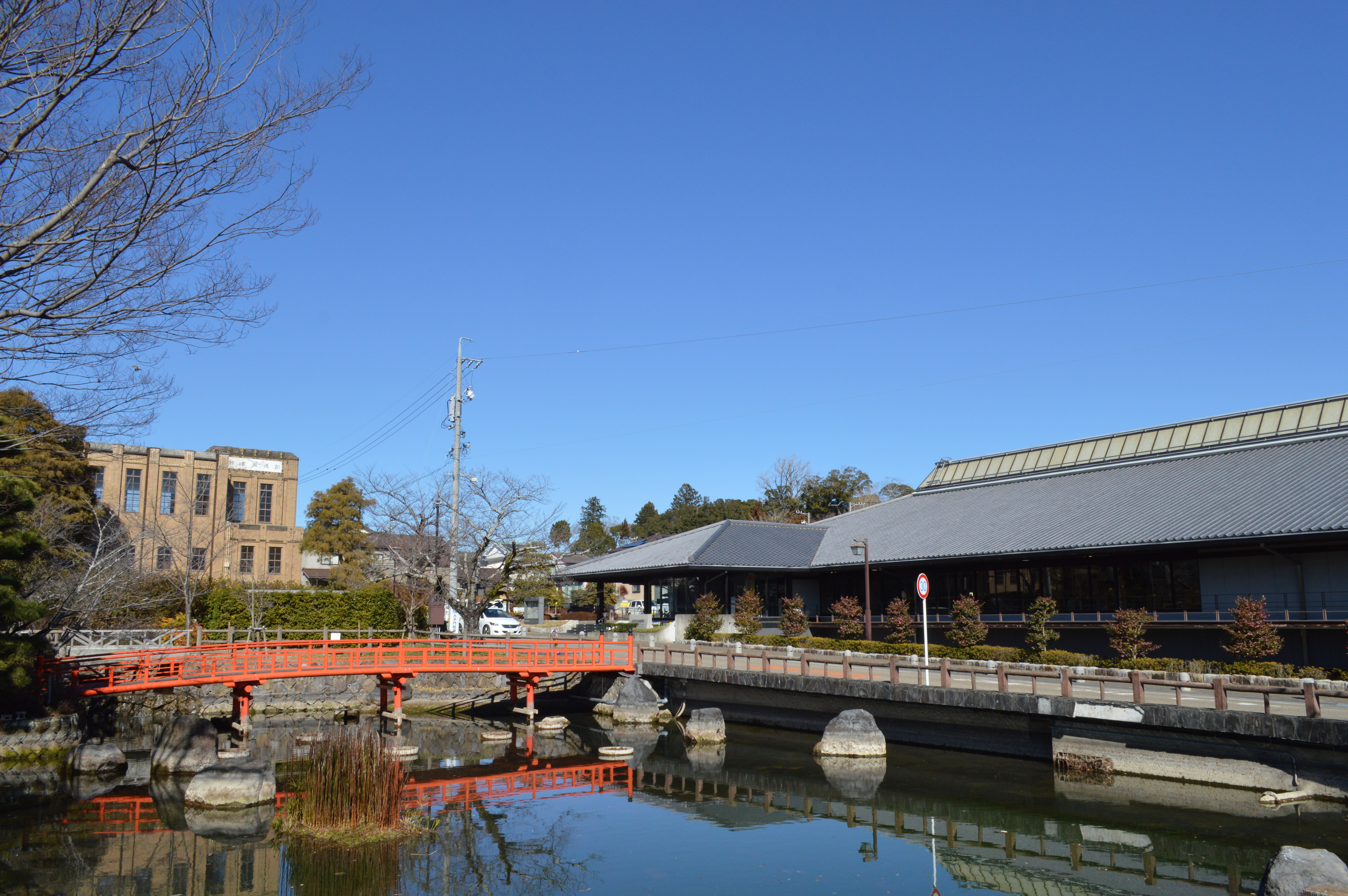 掛川市立中央図書館（右）と淡山翁記念報徳図書館（左奥）。